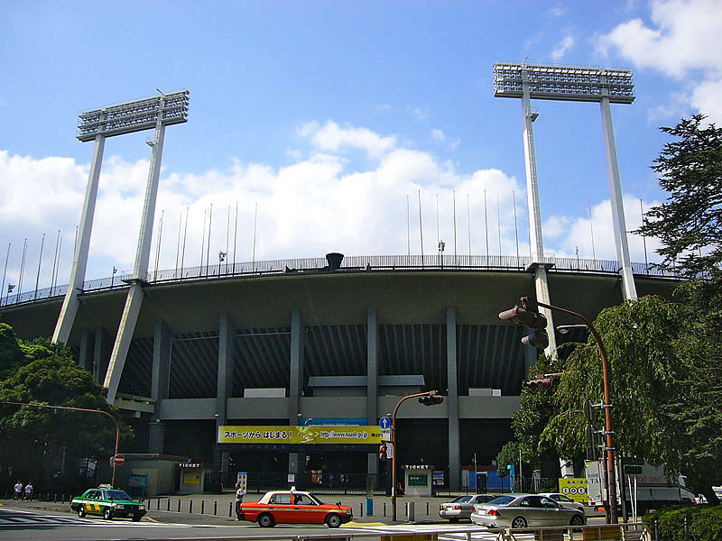 Kokuritsu Kasumigaoka Rikujo Kyogijo, Shinjuku-ku, Tokyo, Japan